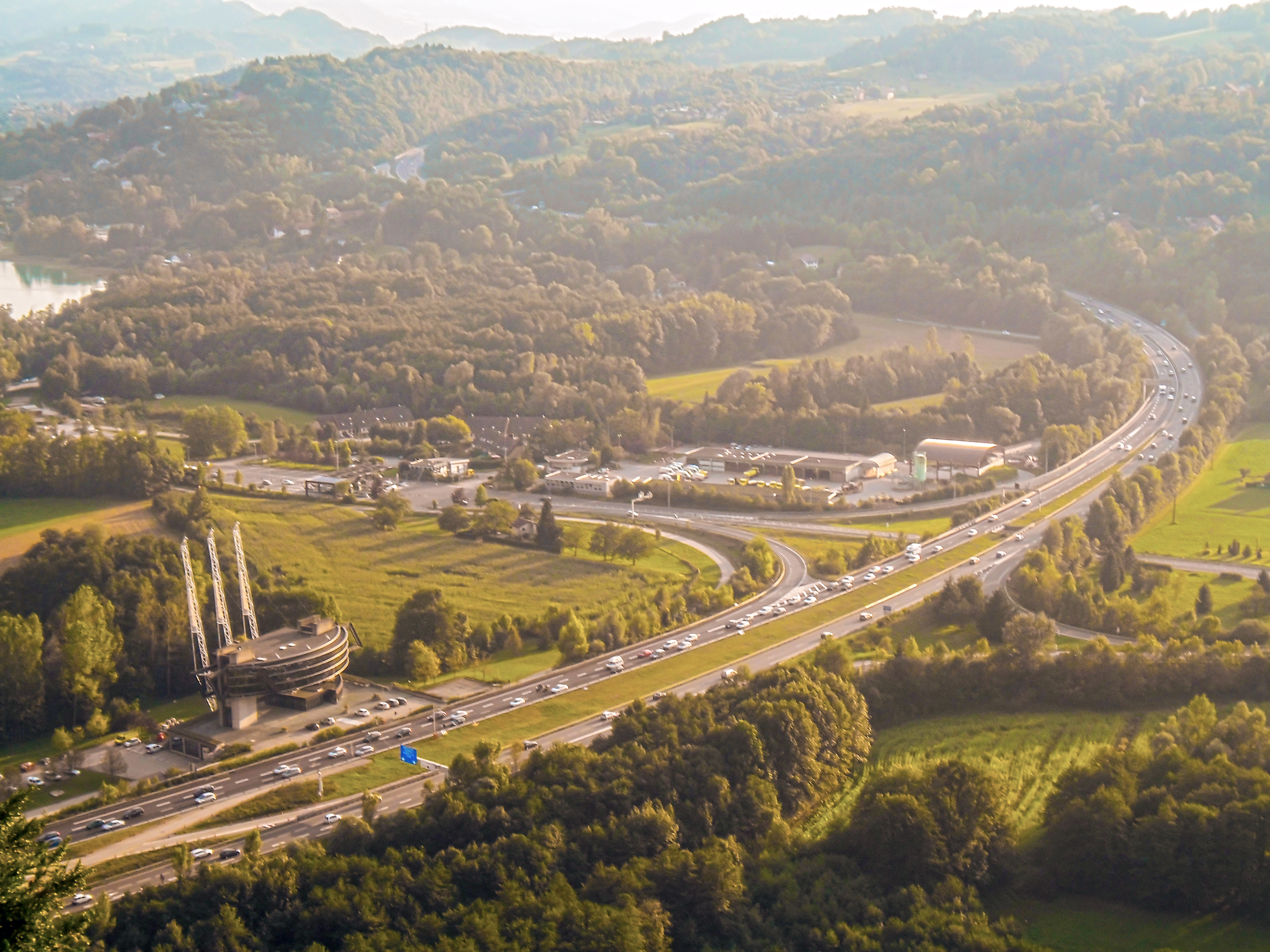 Photo de l'autoroute A43 a proximité du lac d'Aiguebelette et du tunnel de l'épine. Cette photo a été prise durant l'été 2012 et a été retouché sur Photoshop CS6.